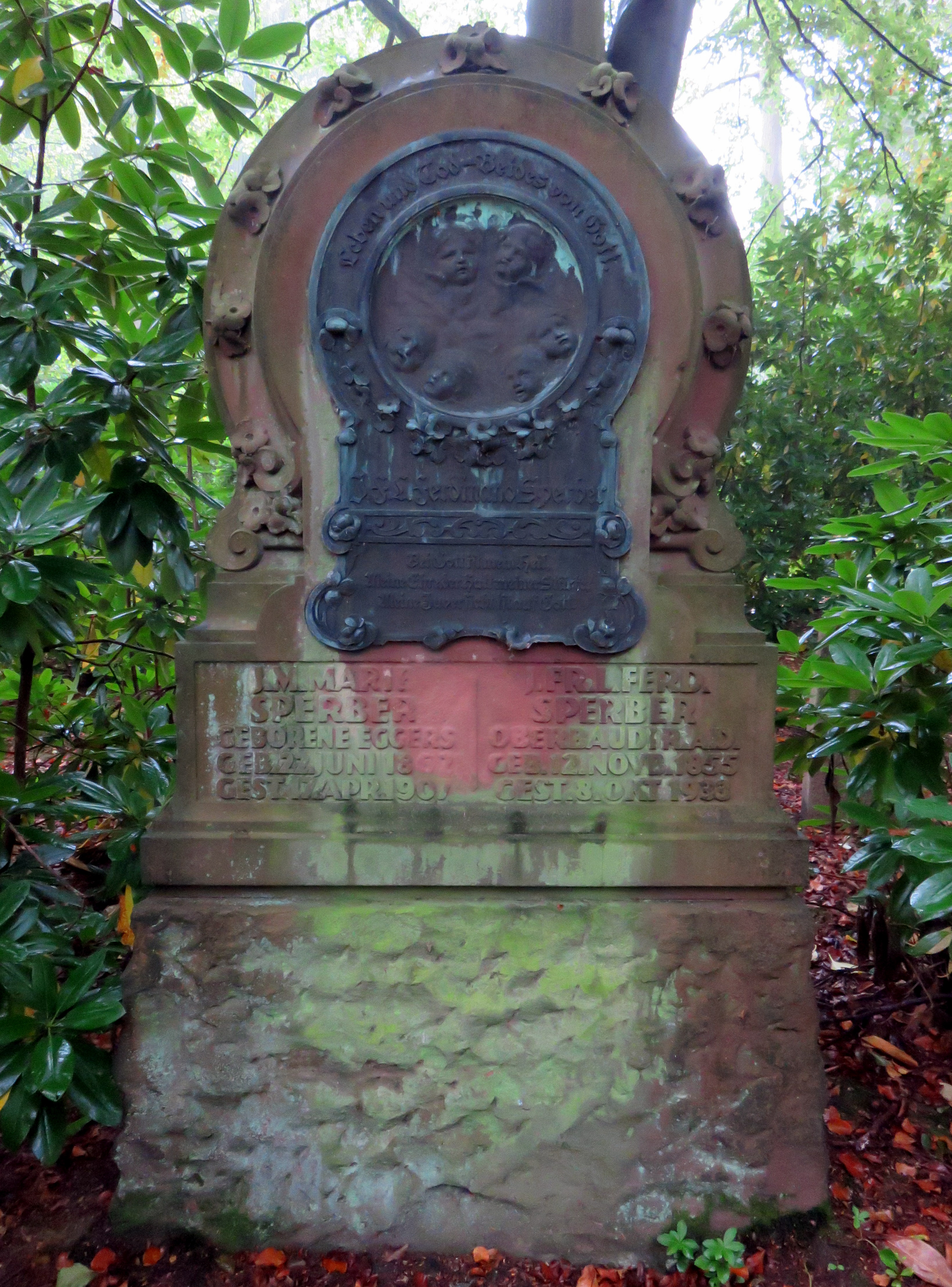 Grabmal für den deutschen Ingenieur Ferdinand Sperber, 1905 geschaffen vom deutschen Architekten Wilhelm Cordes auf dem Hamburger Friedhof Ohlsdorf, Planquadrat X 20 (nordöstlich Kapelle 2).